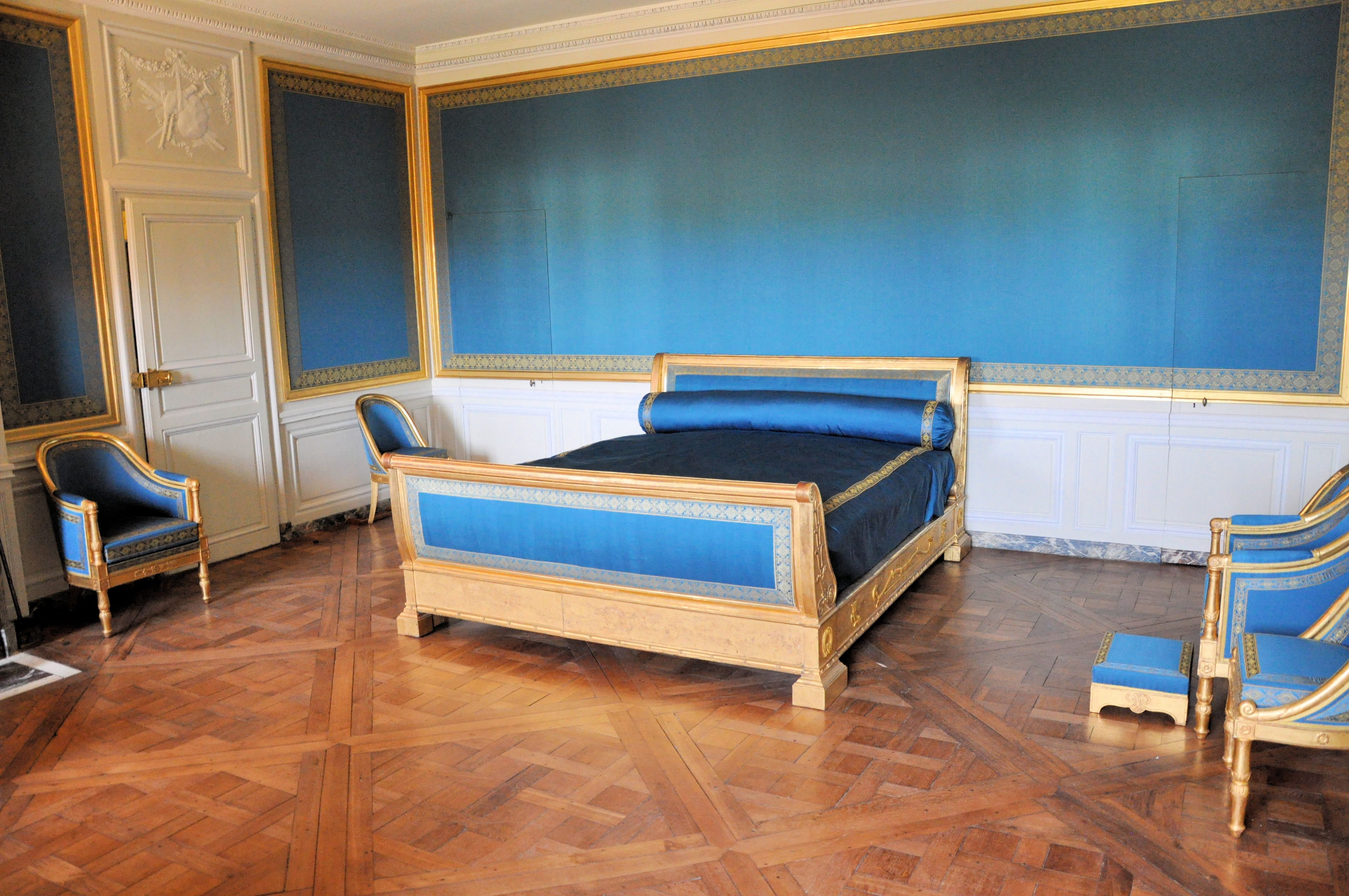 Petit Trianon - Attique - Salle évoquant la chambre de l'impératrice Marie-Louise puis de la duchesse d'Orléans